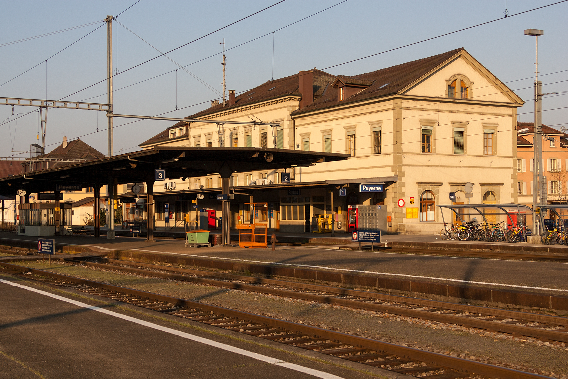 Bahnhof in Payerne (VD)